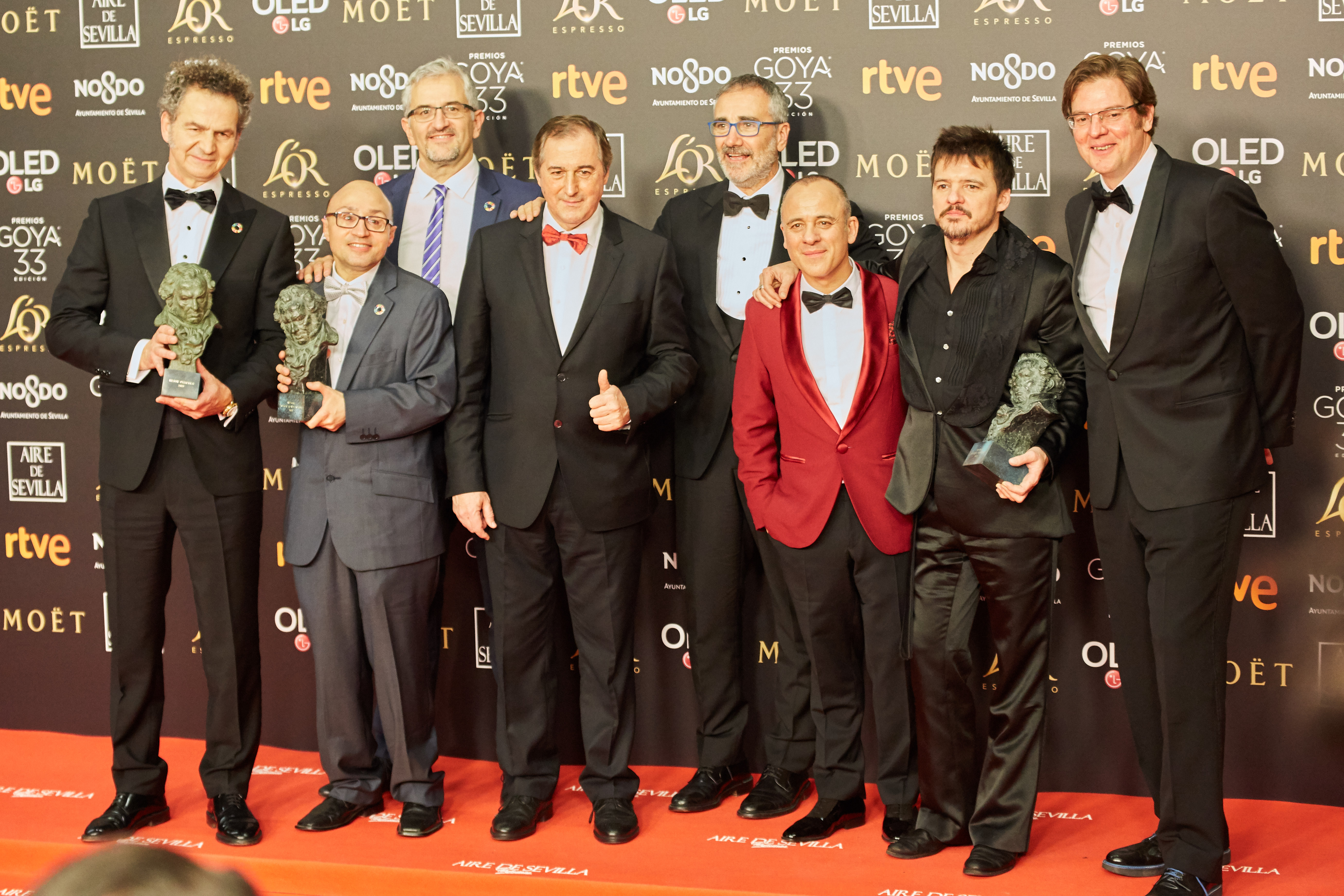 Ganadores de diversos Goya por la película Campeones